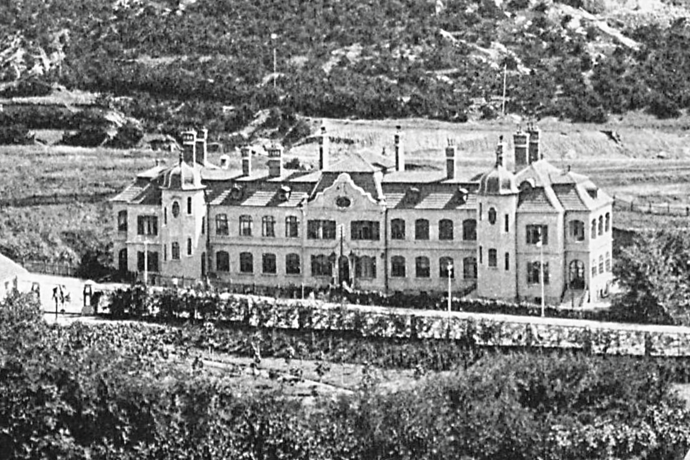 青岛督署医院办公楼